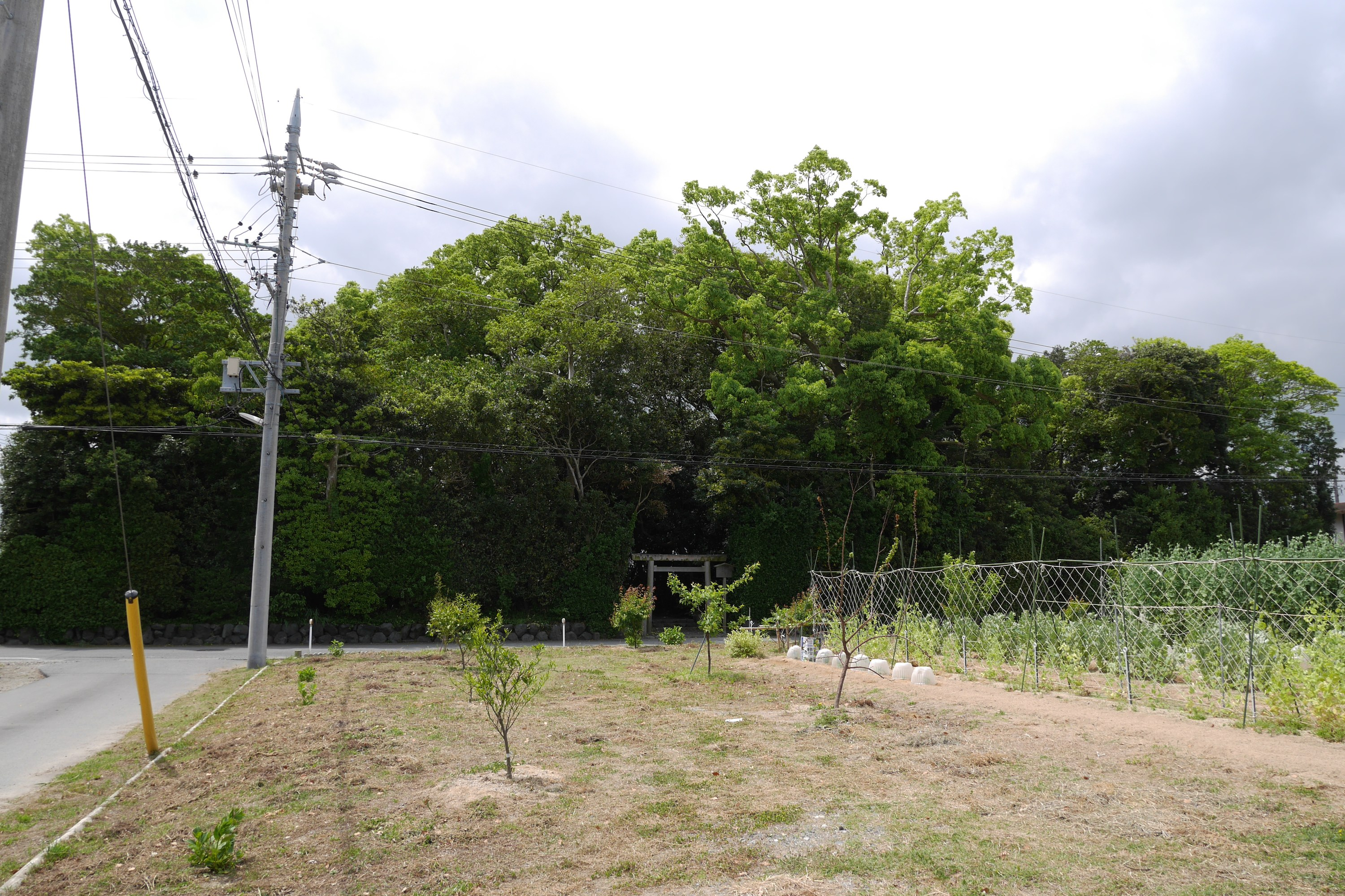 日本の三重県伊勢市大湊町にある豊受大神宮末社の志宝屋神社（しおやじんじゃ）の社叢全景。参道口に鳥居が見える。